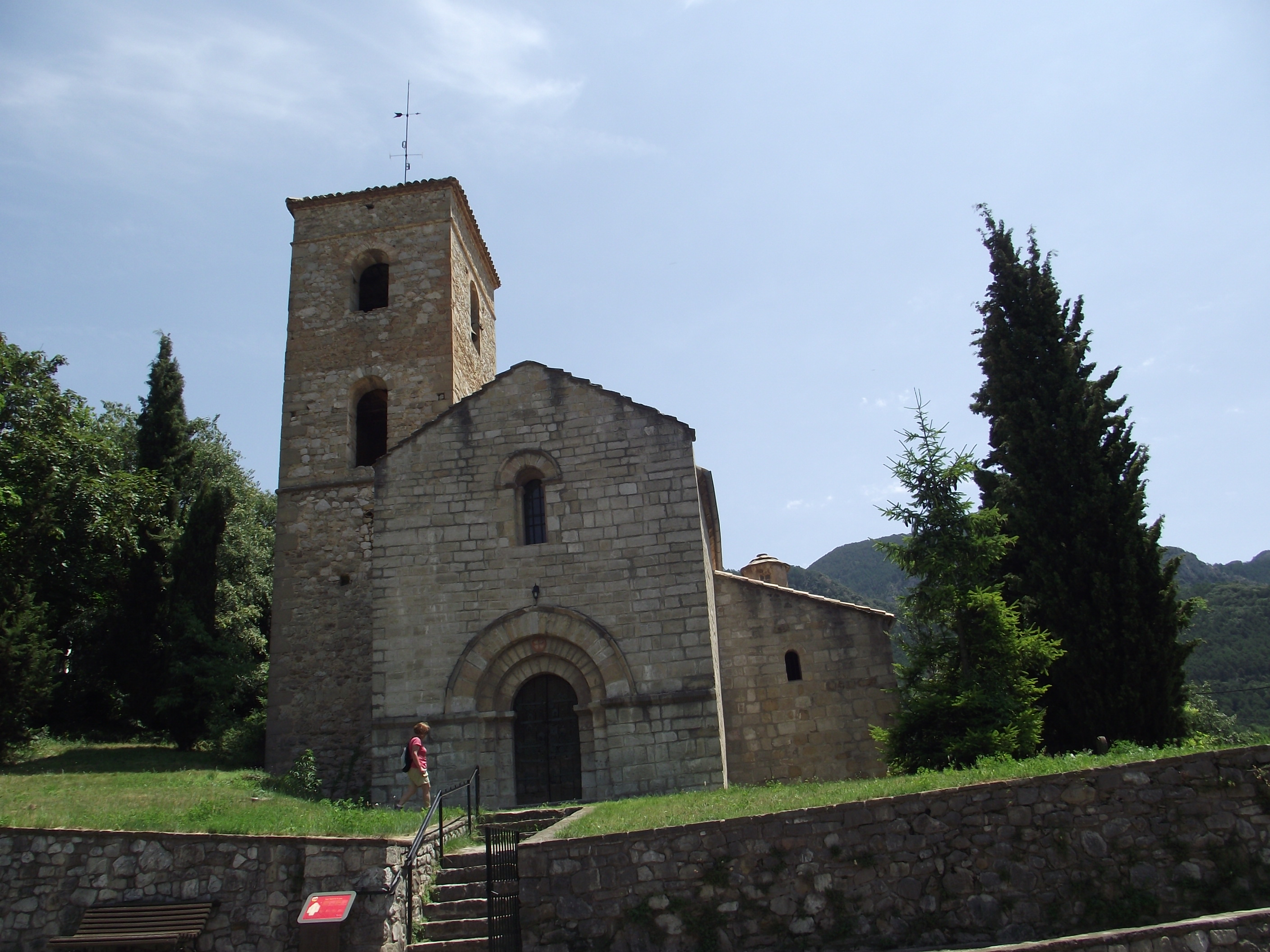 Església de Sant Martí (la Nou de Berguedà)